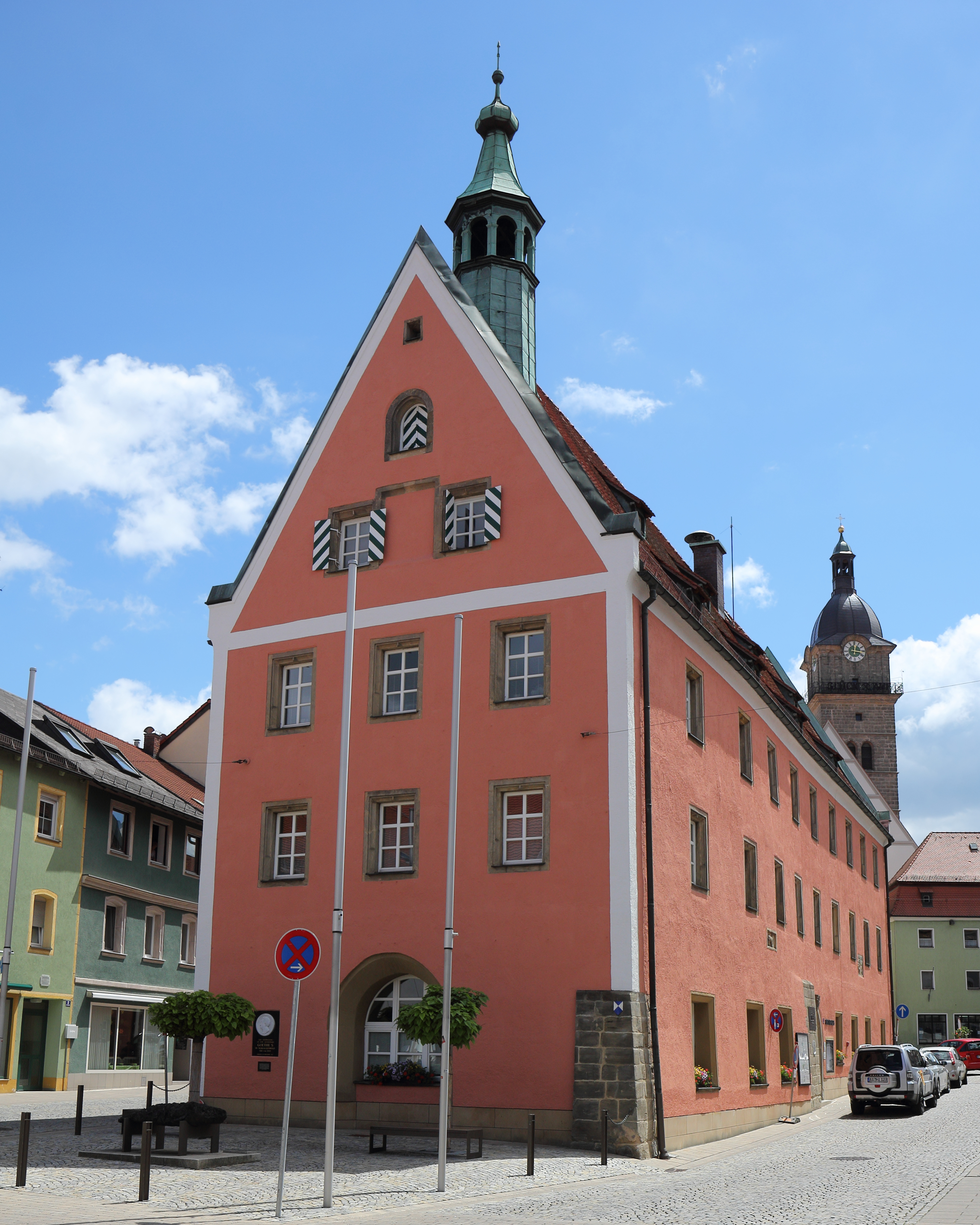 Auerbach in der Oberpfalz - Oberer Marktplatz 1 - Rathaus. Freistehender, dreigeschossiger Bau mit steilem Satteldach und Dachreiter, wohl um 1551, 1928/29 Umbau und Erneuerung.